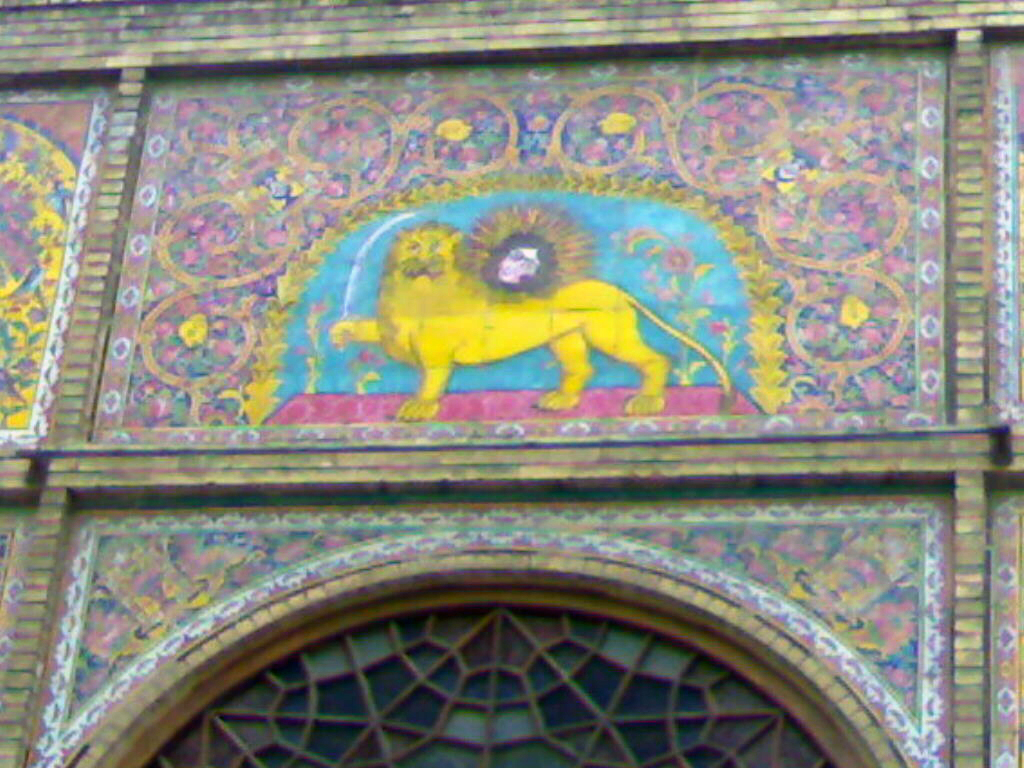 شیر و خورشید بر دیوار حیاط کاخ گلستان، عکس‌برداری در سال ۱۳۸۷ (The lion and Sun, Golistan Palace, Tehran